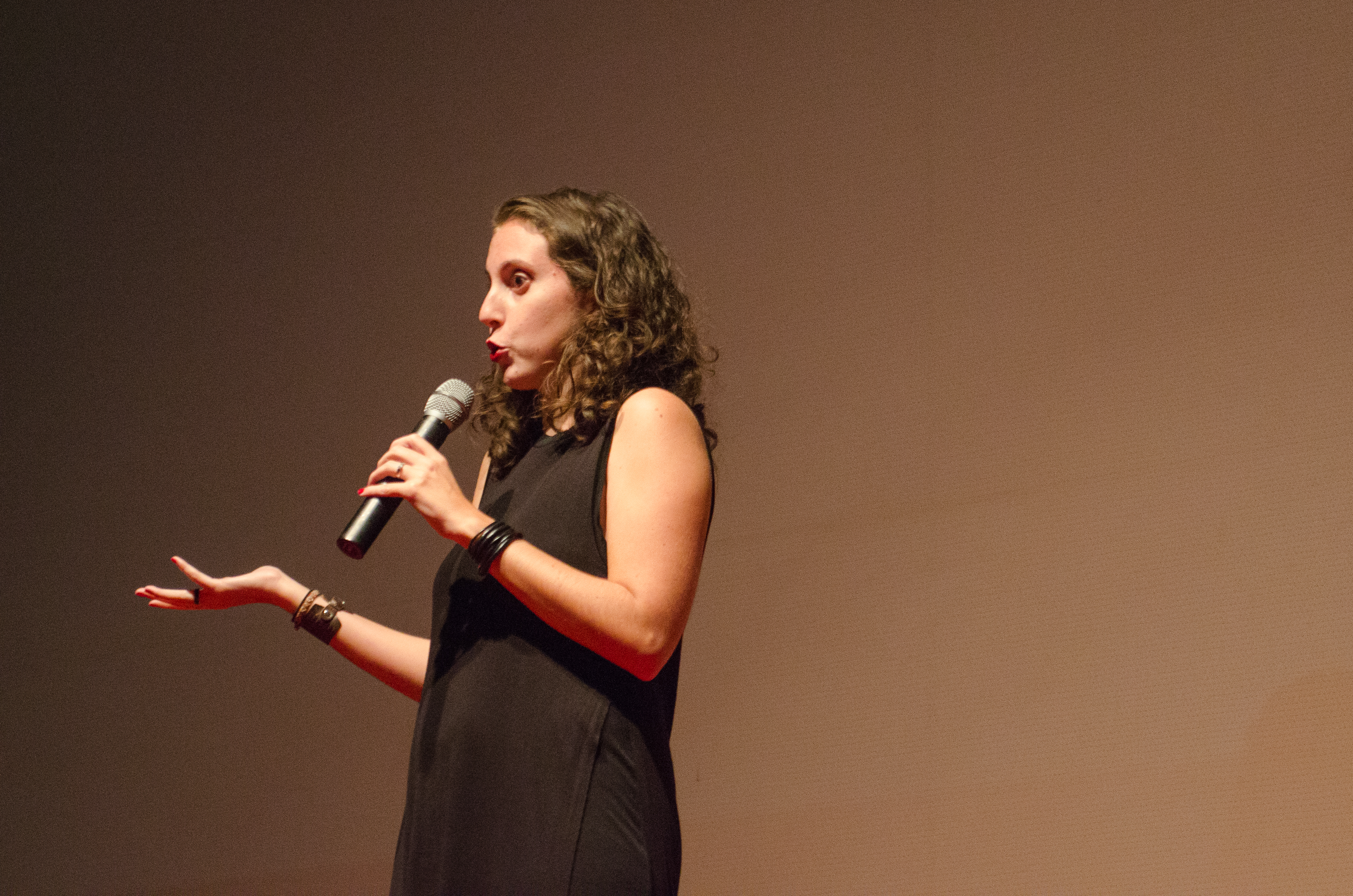 Crédito: Jacqueline Lisboa